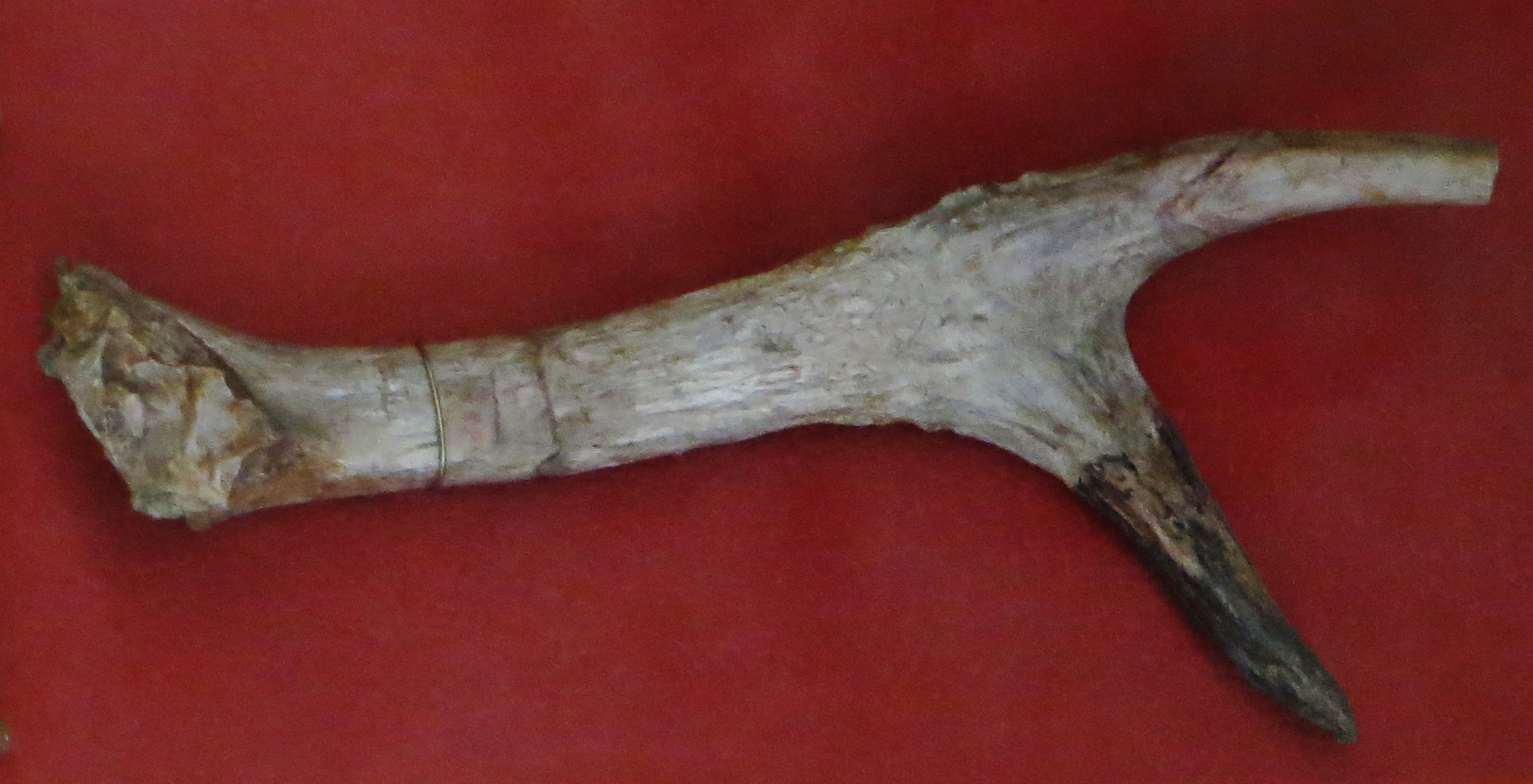 Fossil of Procervulus, an extinct mammal - Took the photo at Musee d'Histoire Naturelle, Paris